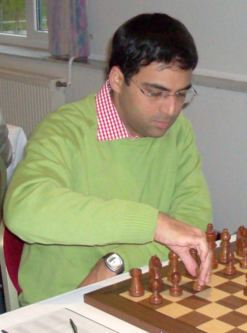 Viswanathan Anand